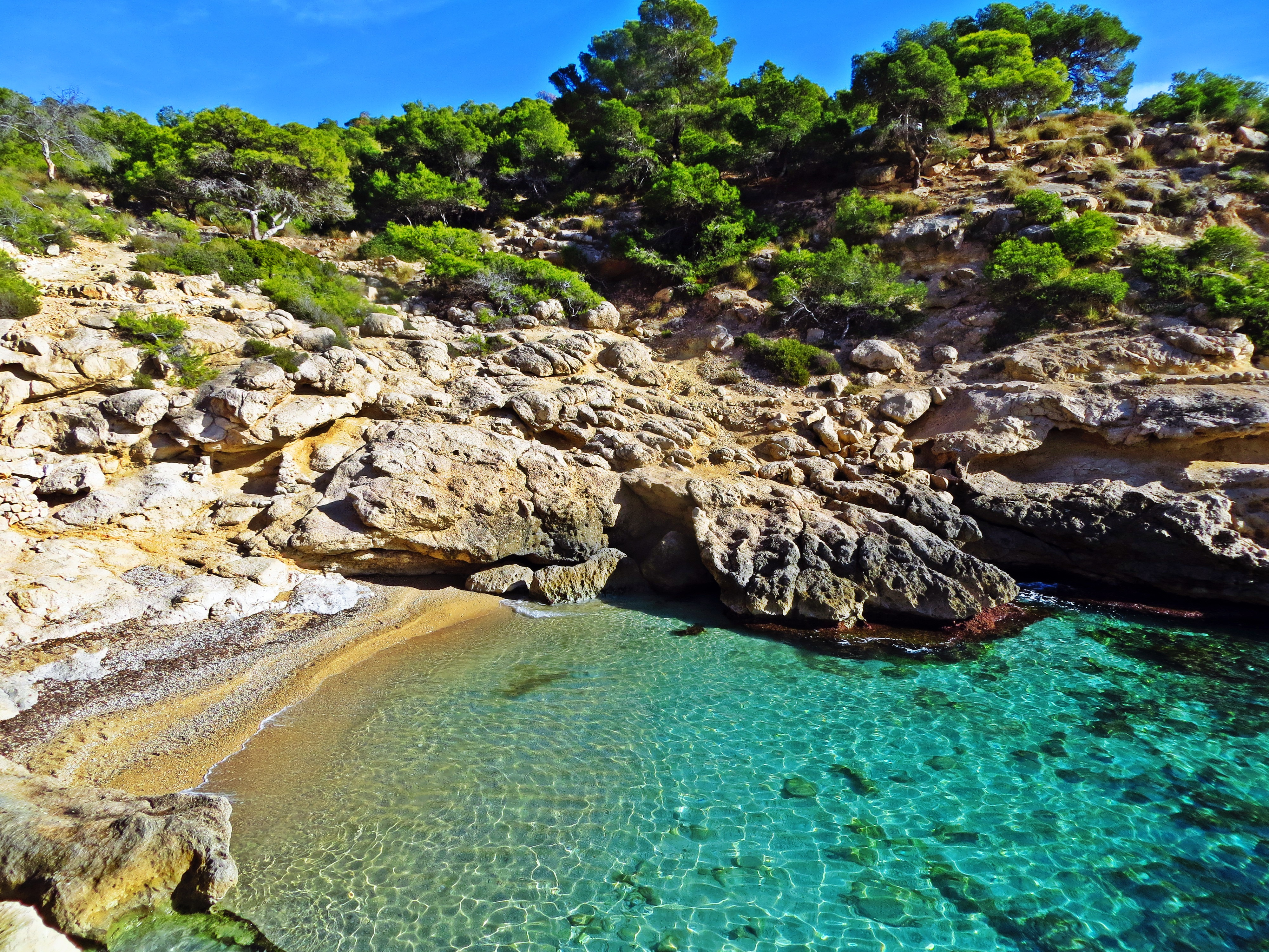 Panorámica de una de las calas del Racó del Conill